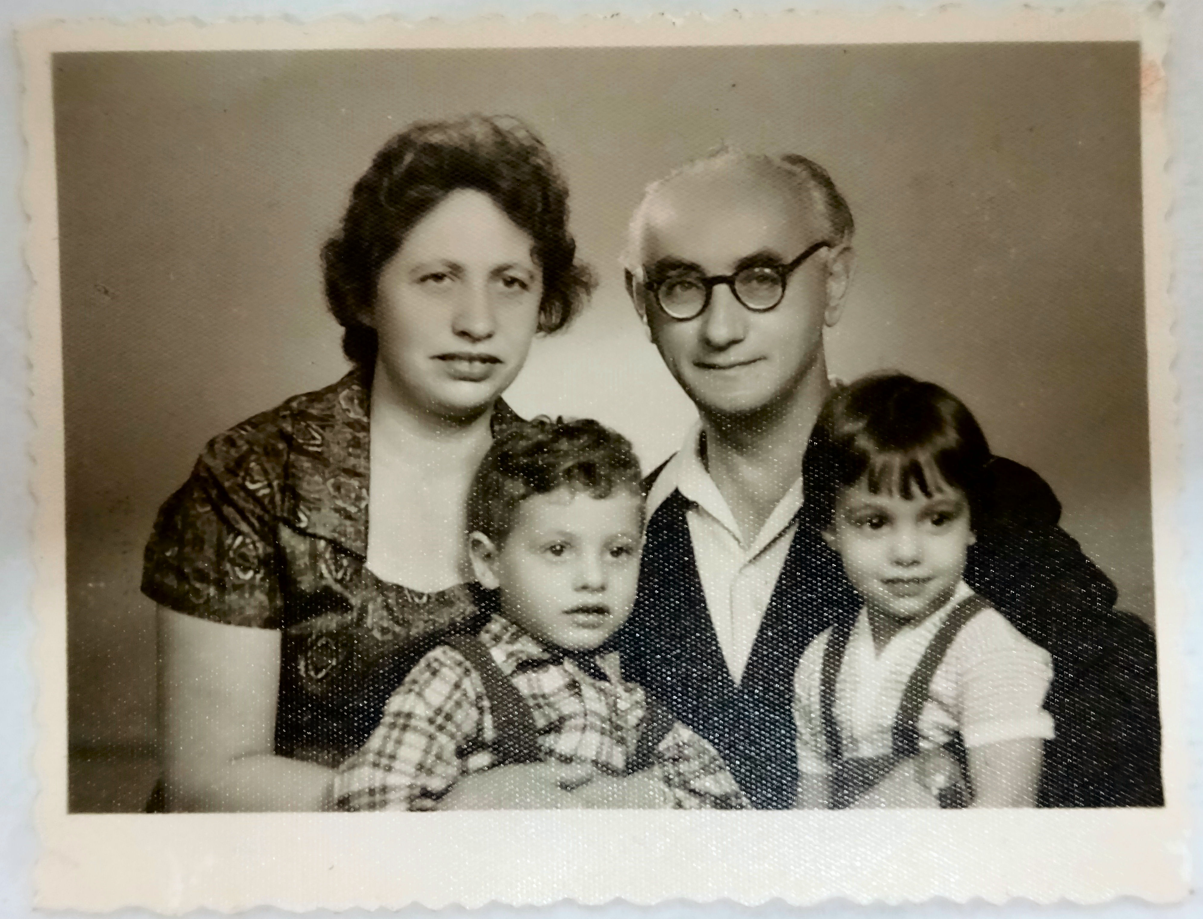 אפרים קופפר יחד עם משפחתו